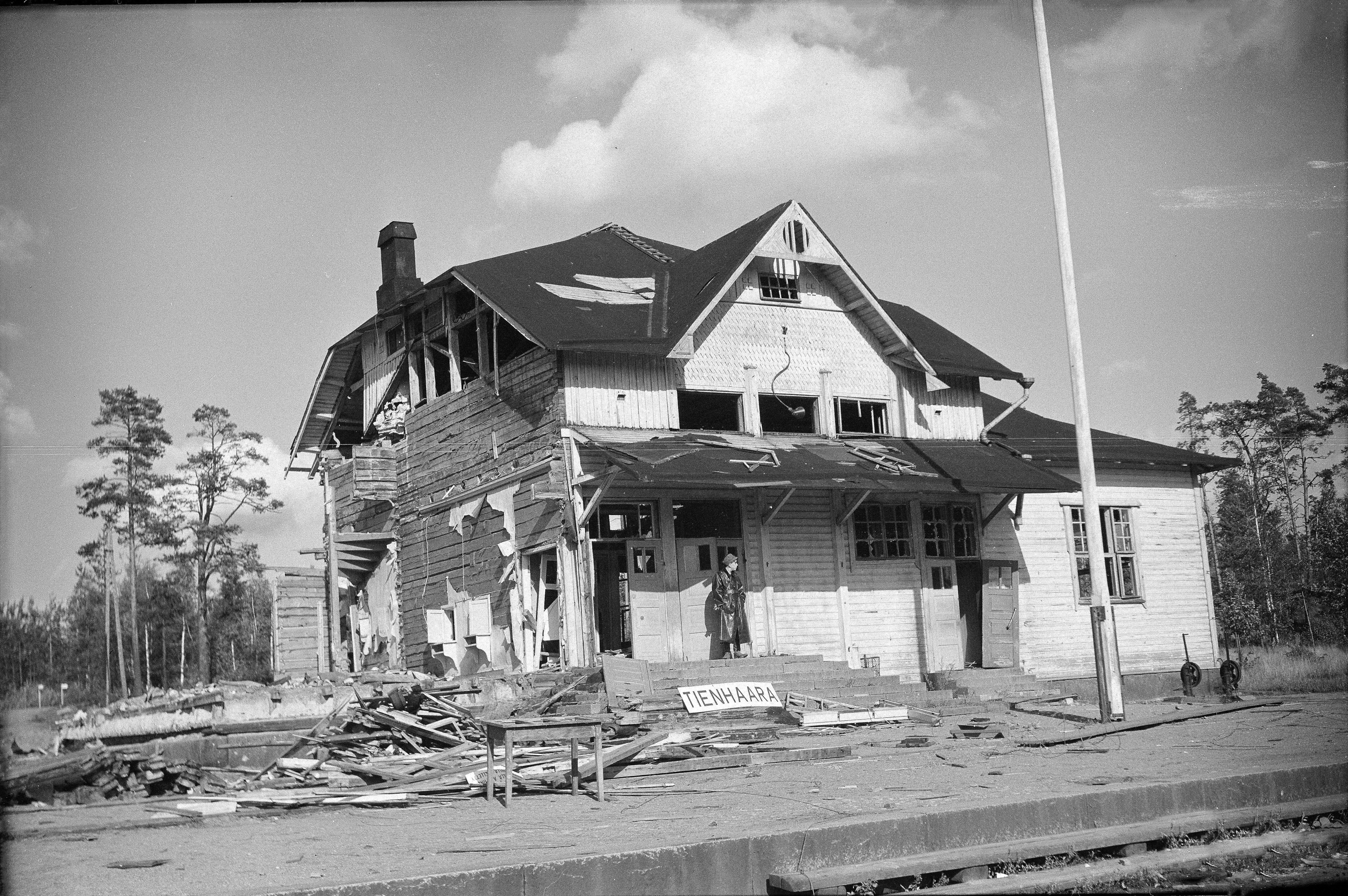 Пригородная.